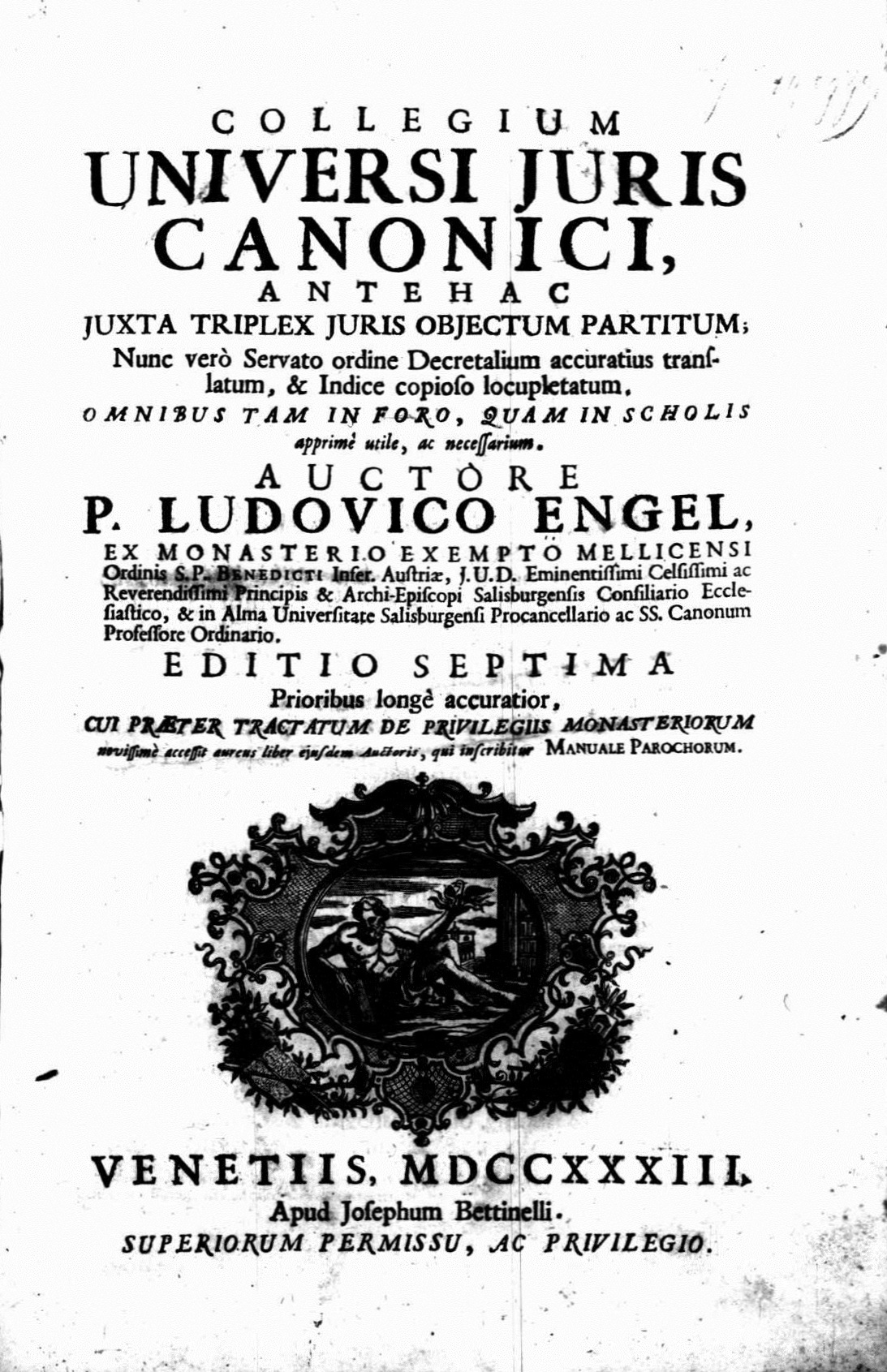 Frontespizio